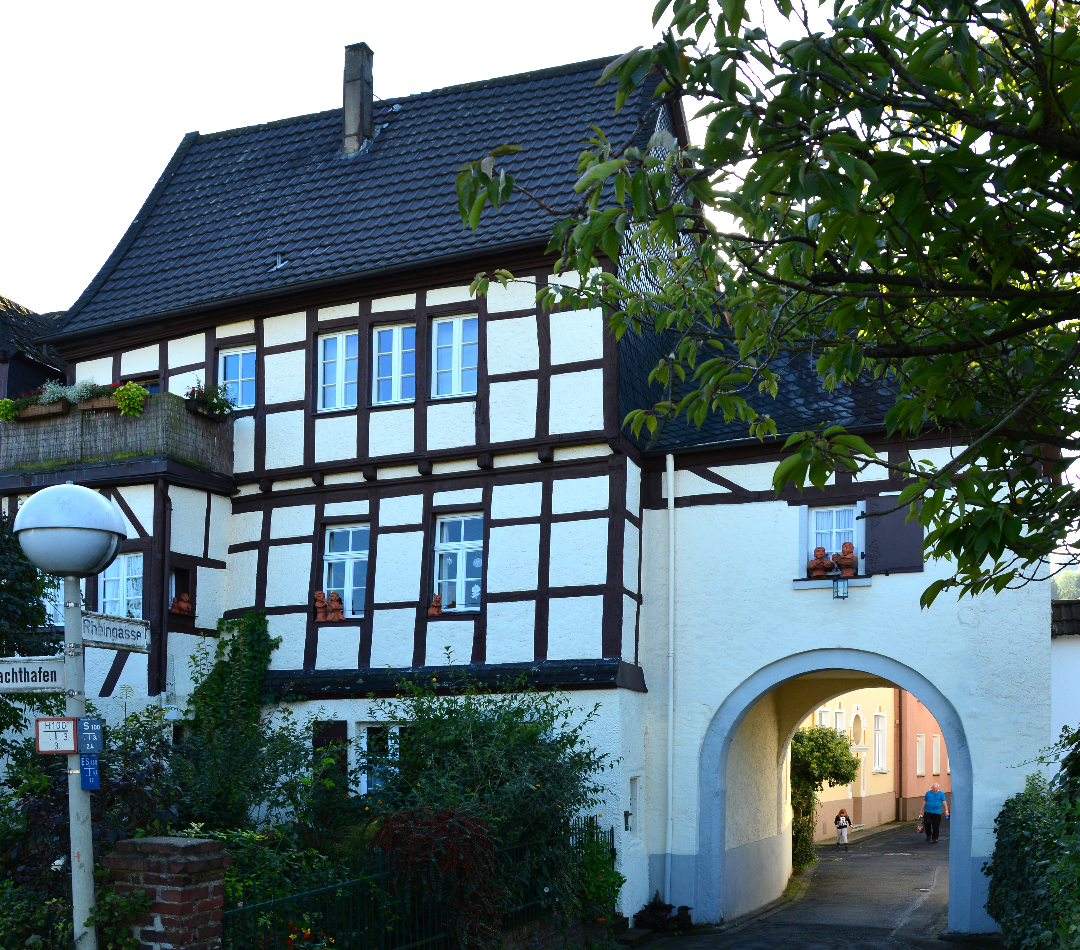 Ehemaliges Burghaus mit Stadtmauertor, Am Yachthafen 10, Oberwinter